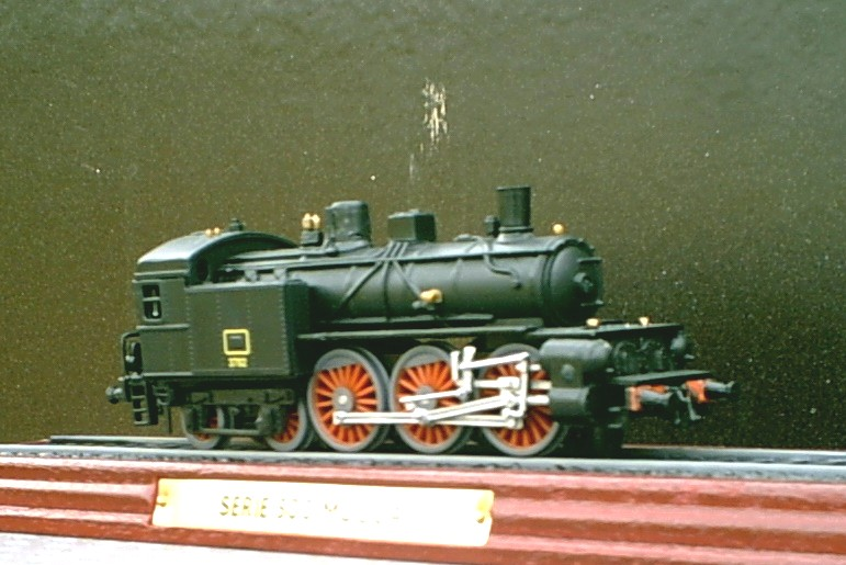 Foto di una locomotiva italiana Gruppo 670